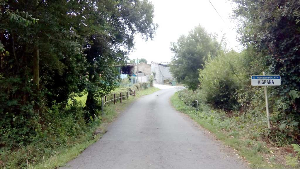 Vista da Graña, Curtis (Foxado)